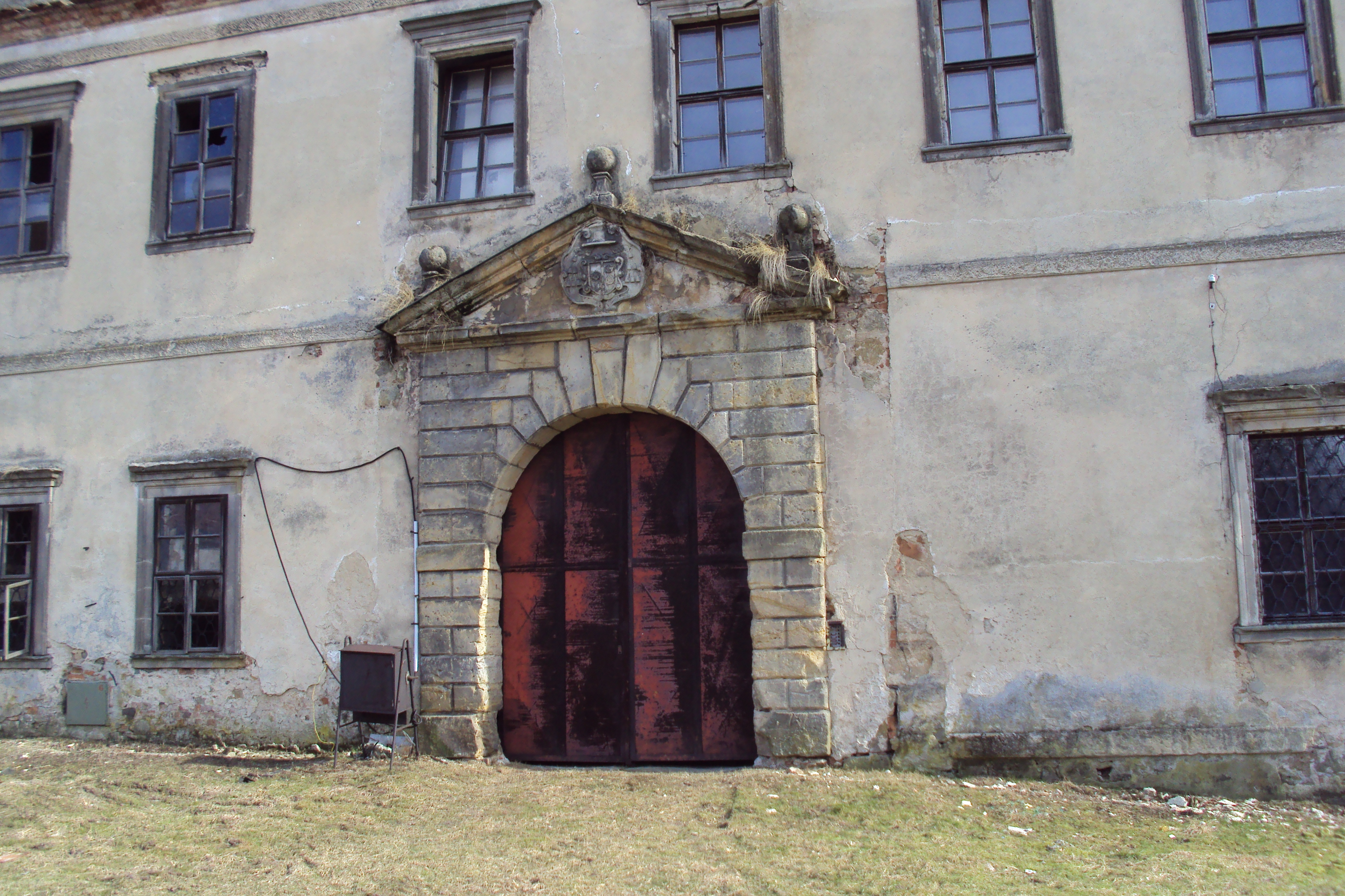 Zámek Stvolínky na Českolipsku, detail